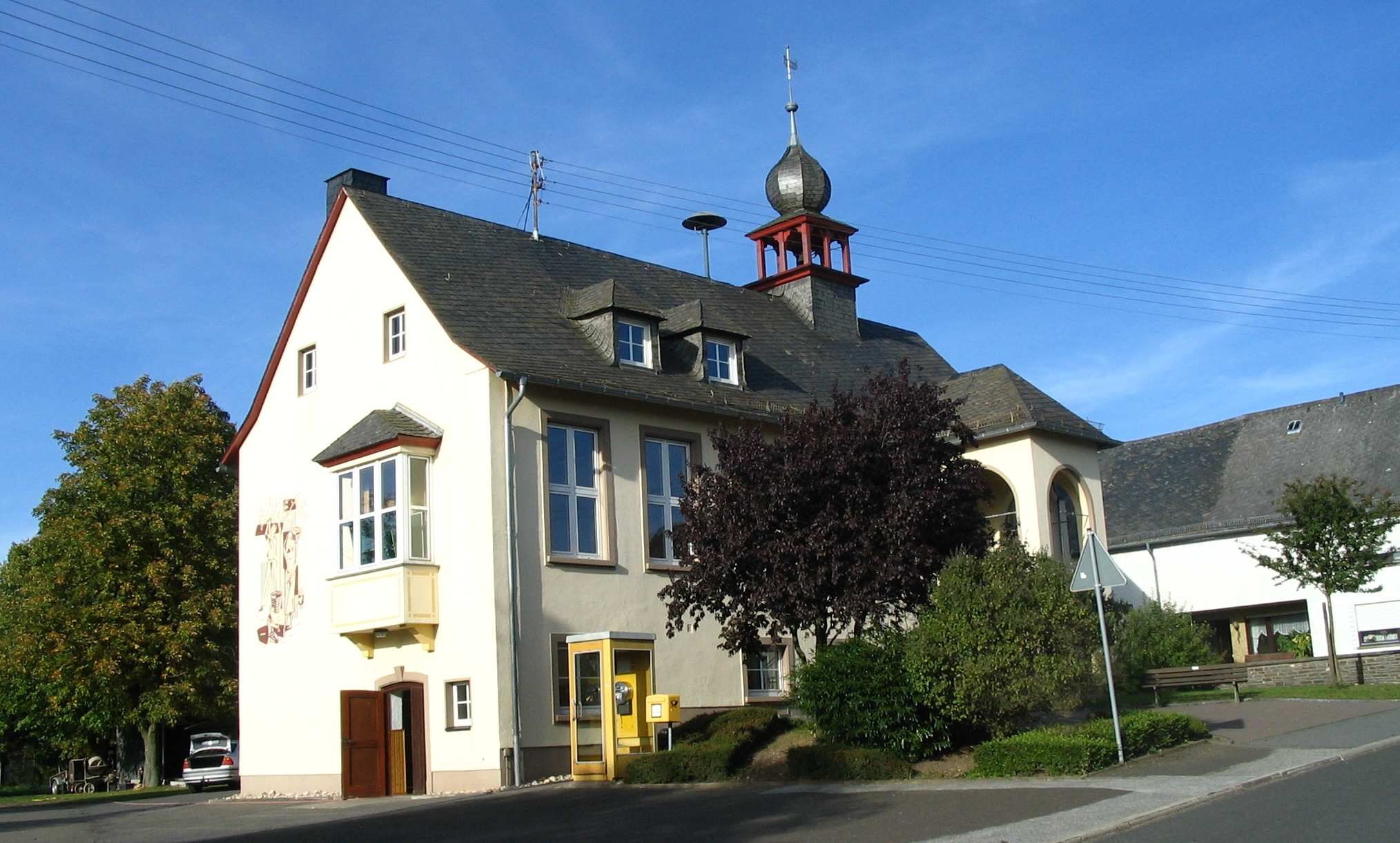 Gemeindehaus Kludenbach in der Ortsmitte